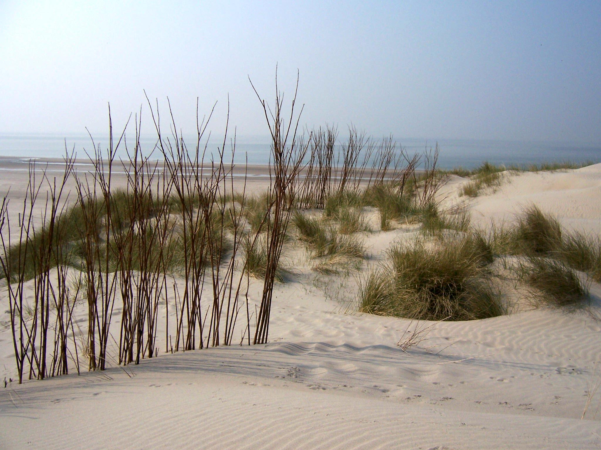 Schouwen-Duiveland, Zeeland, Nederland: duin en strand aan de Noordzee / dune and beach on the North Sea eigen foto / own photo (28/03/2007)